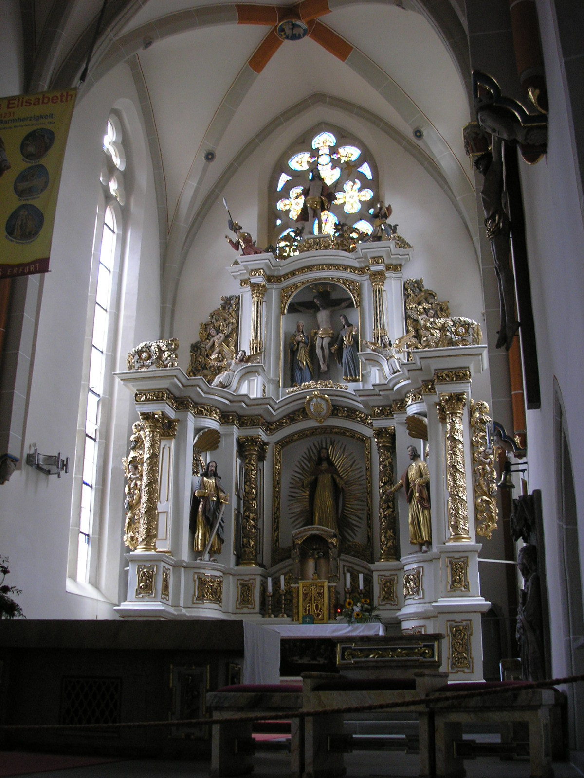 Der Altarraum der katholischen Kirche St. Aegidien in Heiligenstadt (Thüringen).